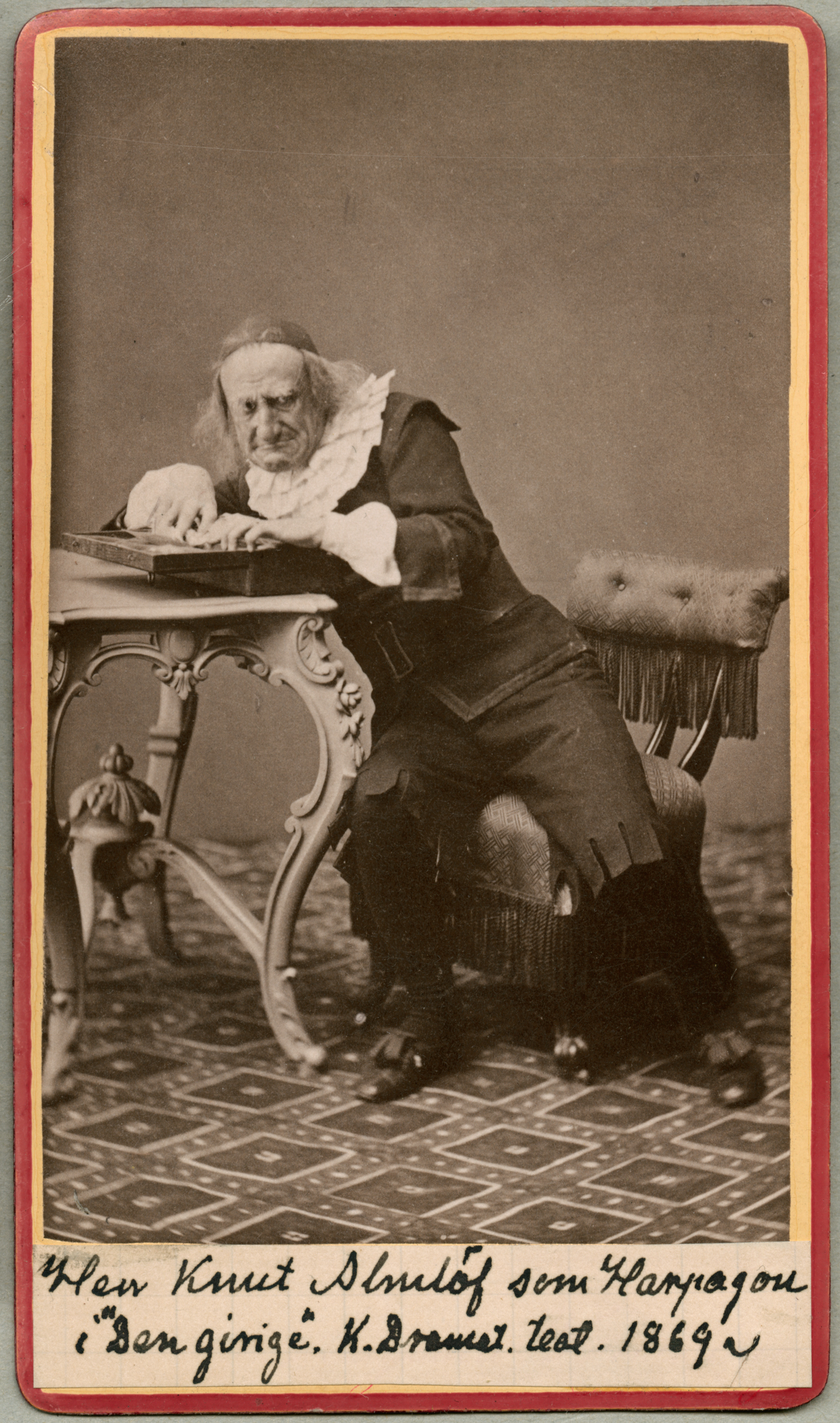 Knut Almlöf som Harpagon i Den girige, Kungliga Dramatiska teatern 1869